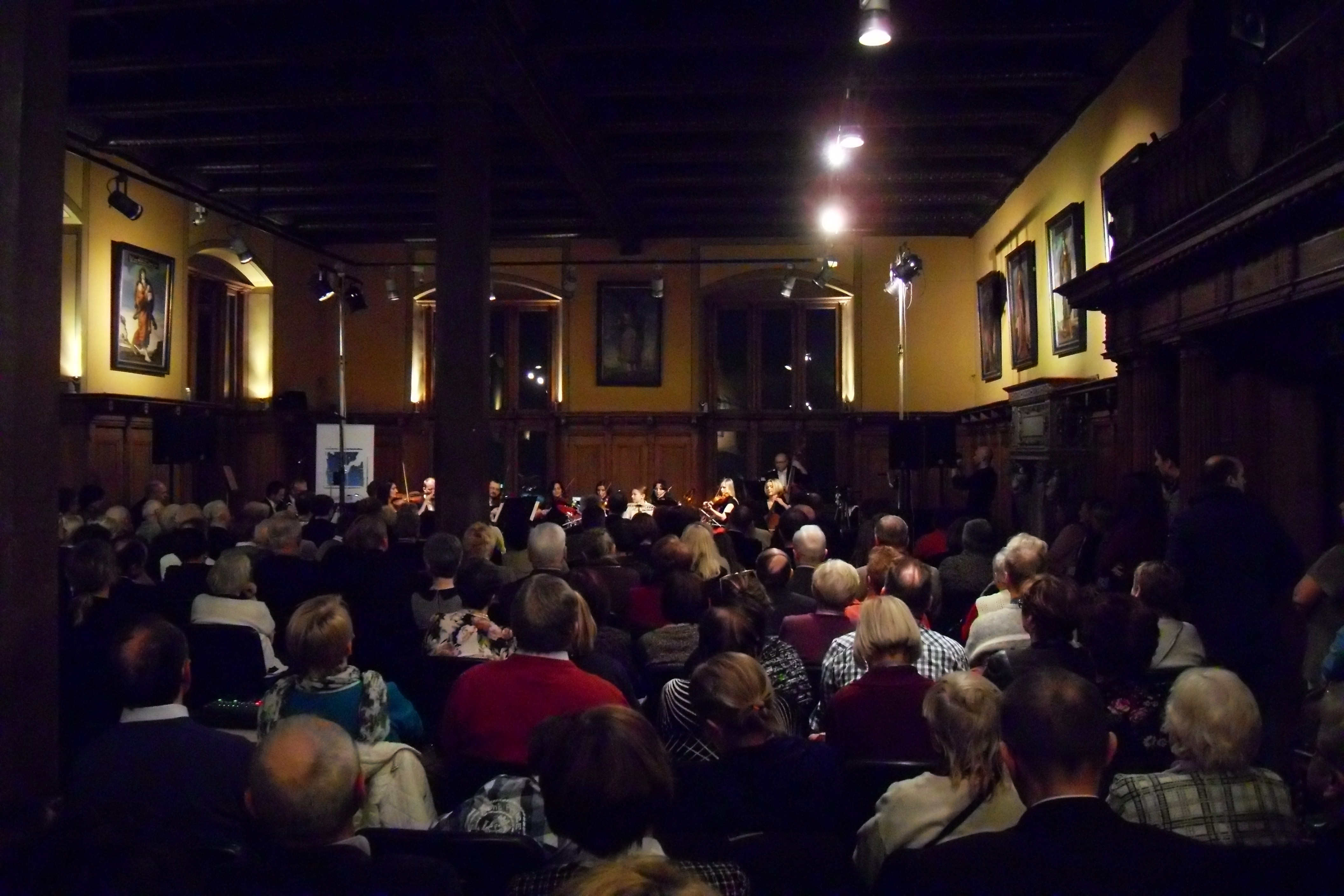 "Cappella Gedanensis" w Ratuszu Starego Miasta w Gdańsku, w Wielkiej Sali.